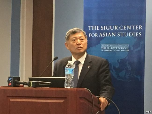 丹佛大學約瑟夫-克貝爾國際研究學院教授兼中美關係中心主任趙穗生。